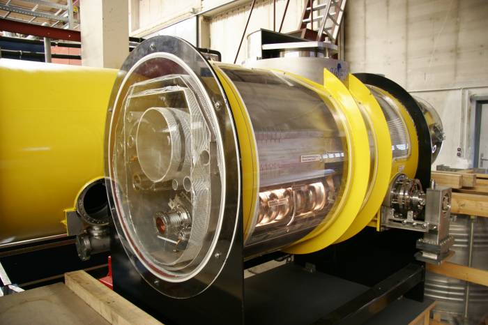 Teilchenbeschleunigermodule vom Freie Elektronen Laser FLASH am DESY in Hamburg; im Vordergrund aufgeschnitten als Schauobjekt; dahinter als Originalstück; die supraleitenden Kavitäten im Schaumodell sind durch Licht deutlich hervorgehoben. Veröffentlichung mit freundliche Genehmigung DESY, Hamburg.